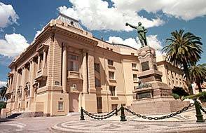 Théâtre Municipal de Bahía Blanca Photographie personnelle de Mbertoni.